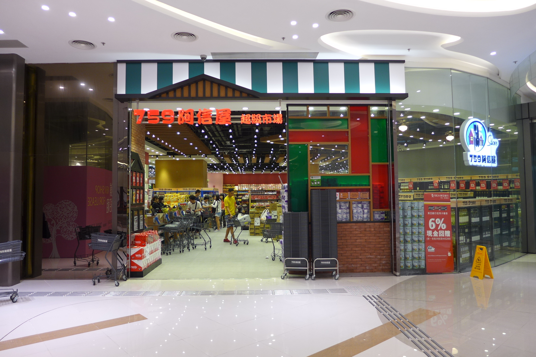 759 Supermarket in GreenCode